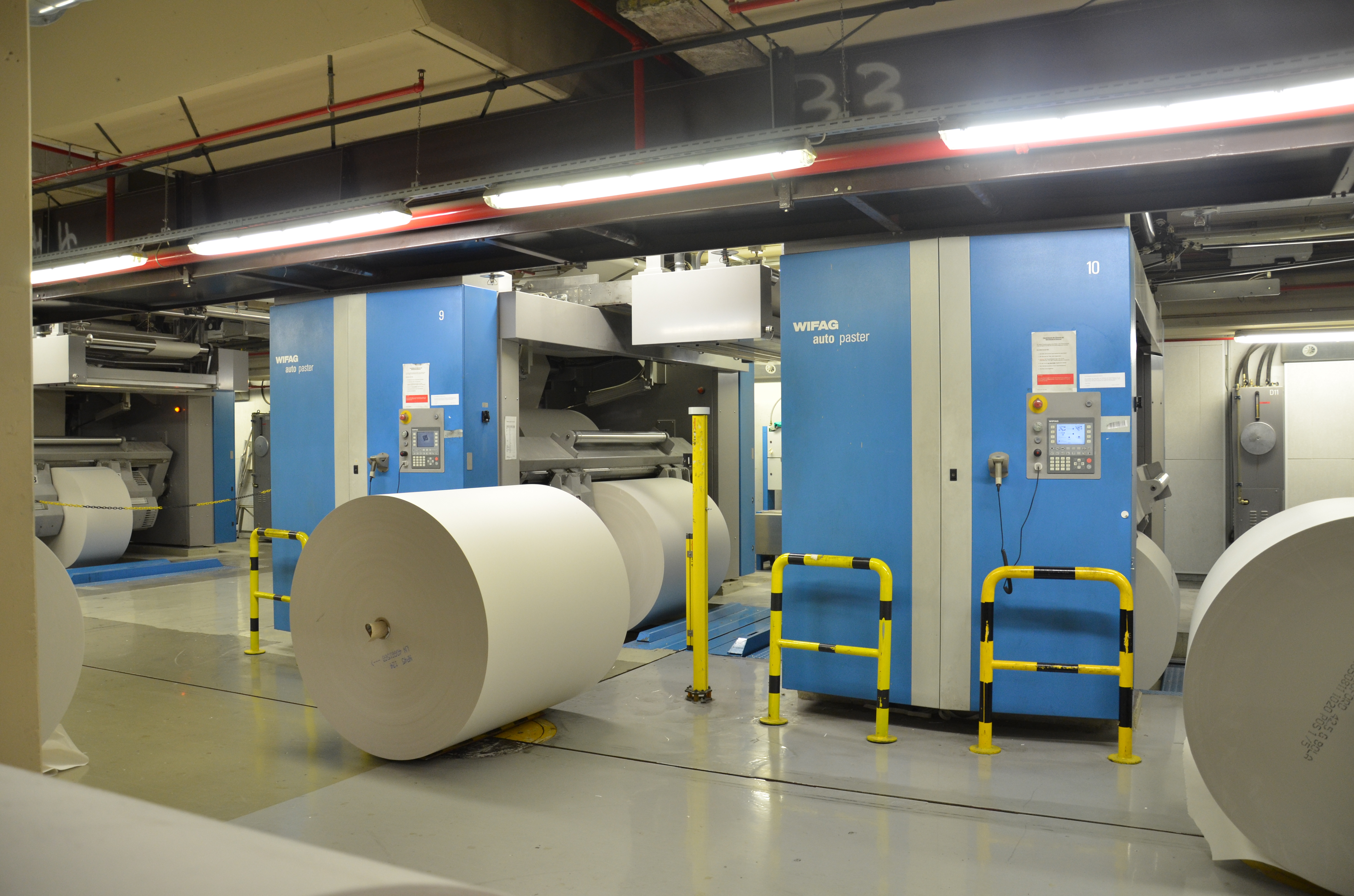 Druckhaus der WAZ Mediengruppe in Essen: unteres Ende der WIFAG-Rotationsdruckmaschine mit der Papiereinfädelung.